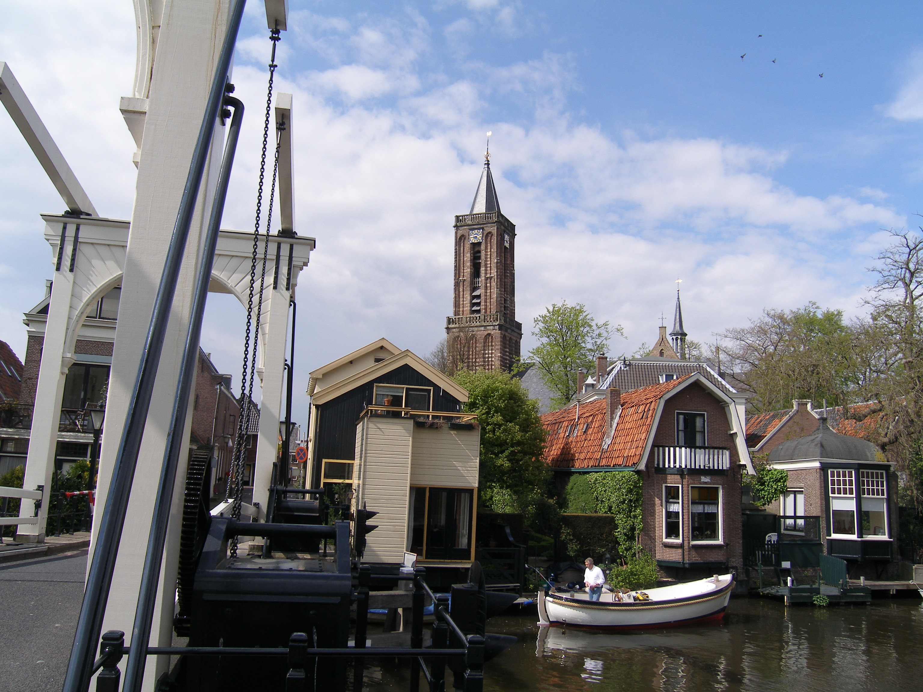 Loenen aan de Vecht, met onder meer links de Dorpsbrug over de rivier de Vecht, midden op de achtergrond de Grote Kerk, en geheel rechts op de oever een rijksmonumentale theekoepel.